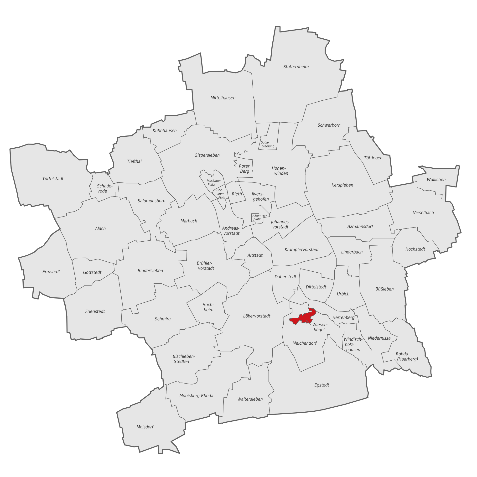 Karte des Stadtgebietes von Erfurt mit Hervorhebung des Ortsteiles Wiesenhügel